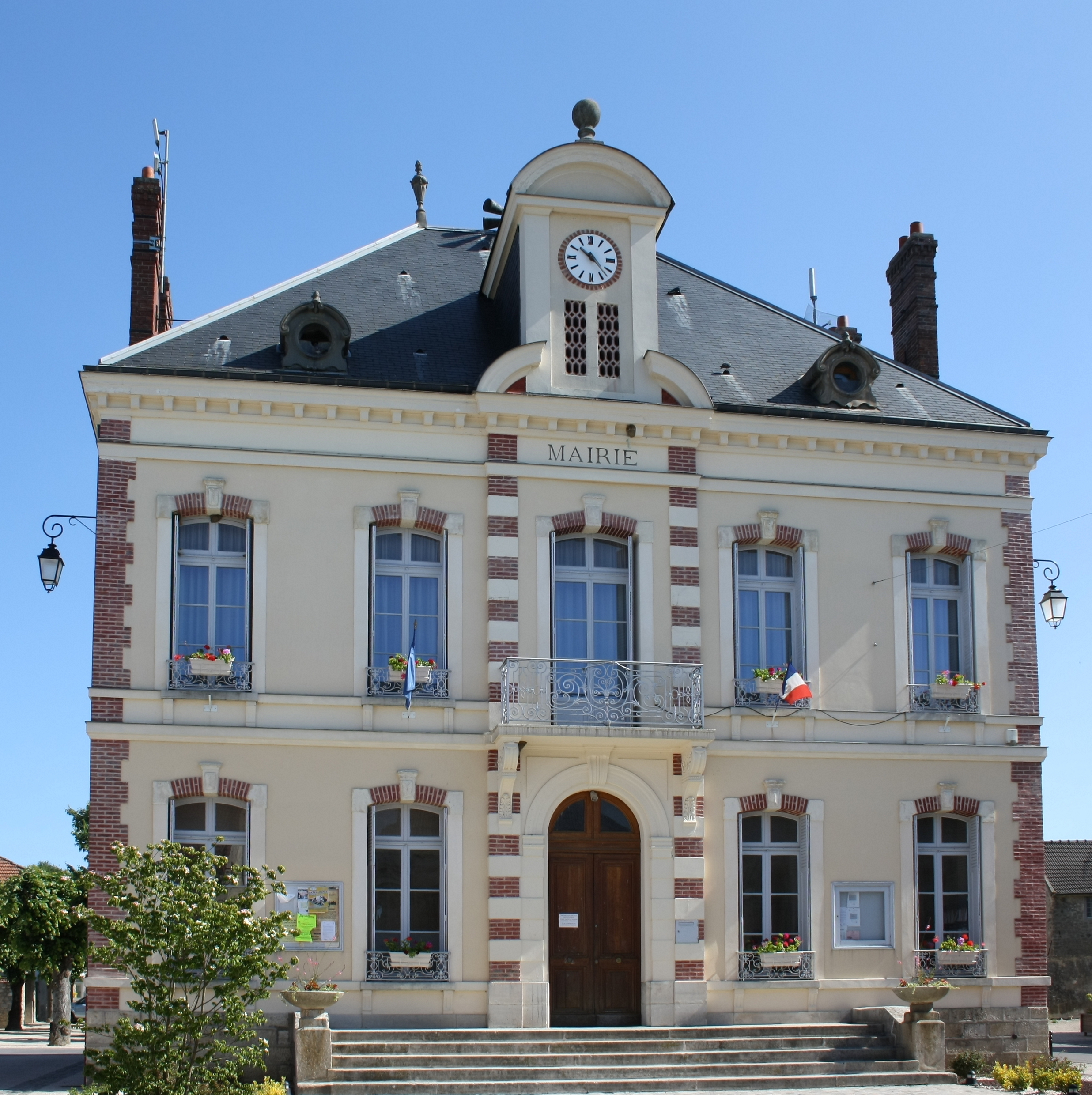 Rathaus von Crouy-sur-Ourcq, einer Gemeinde im Département Seine-et-Marne (Île-de-France)